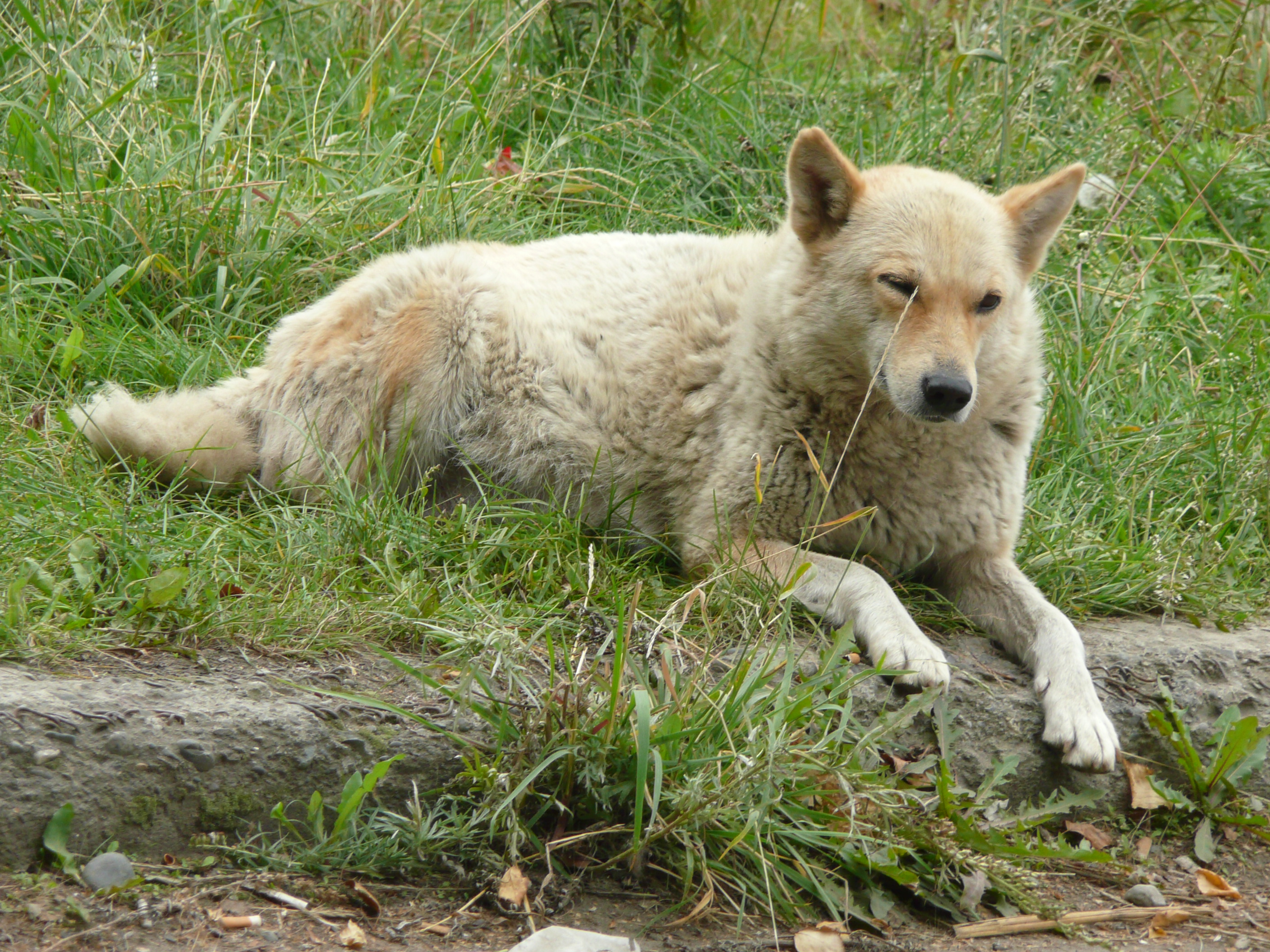 siberian dog